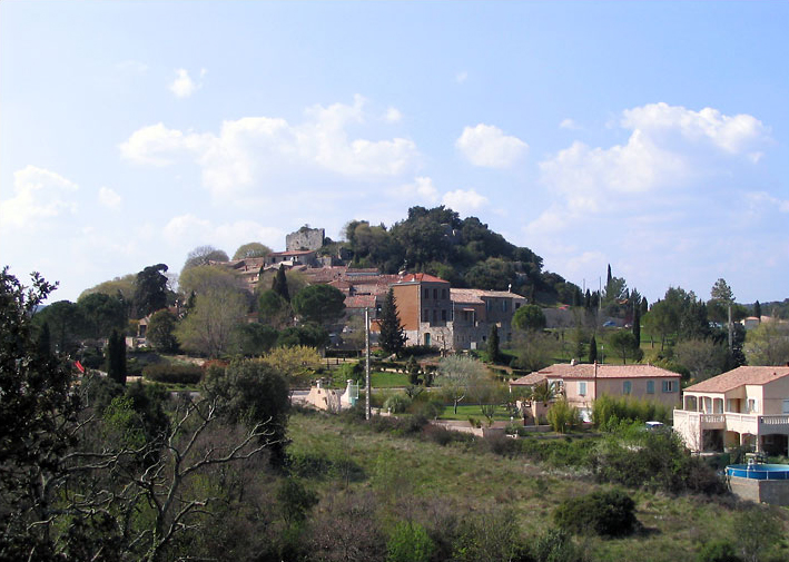 Village de Murles (Hérault, 34), certainement vue de l'Est-Sud-Est.